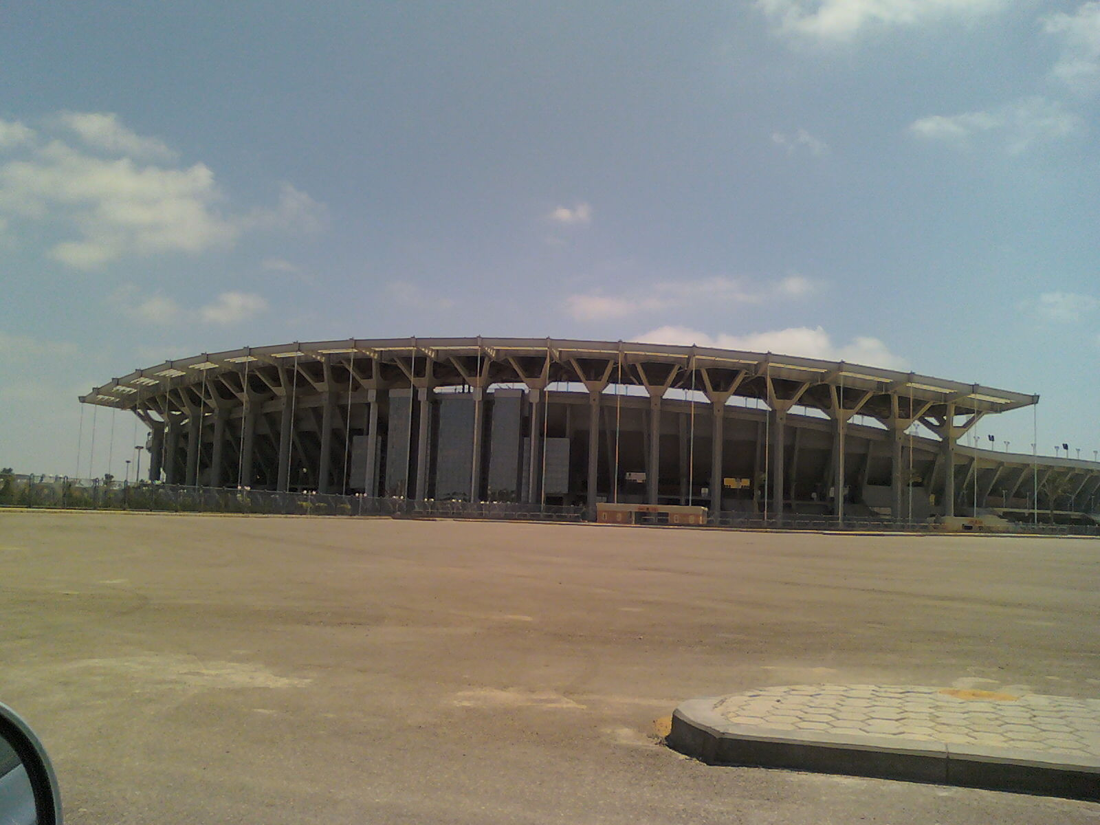 Borg El Arab Stadium, " Army Stadium" Main Entrance